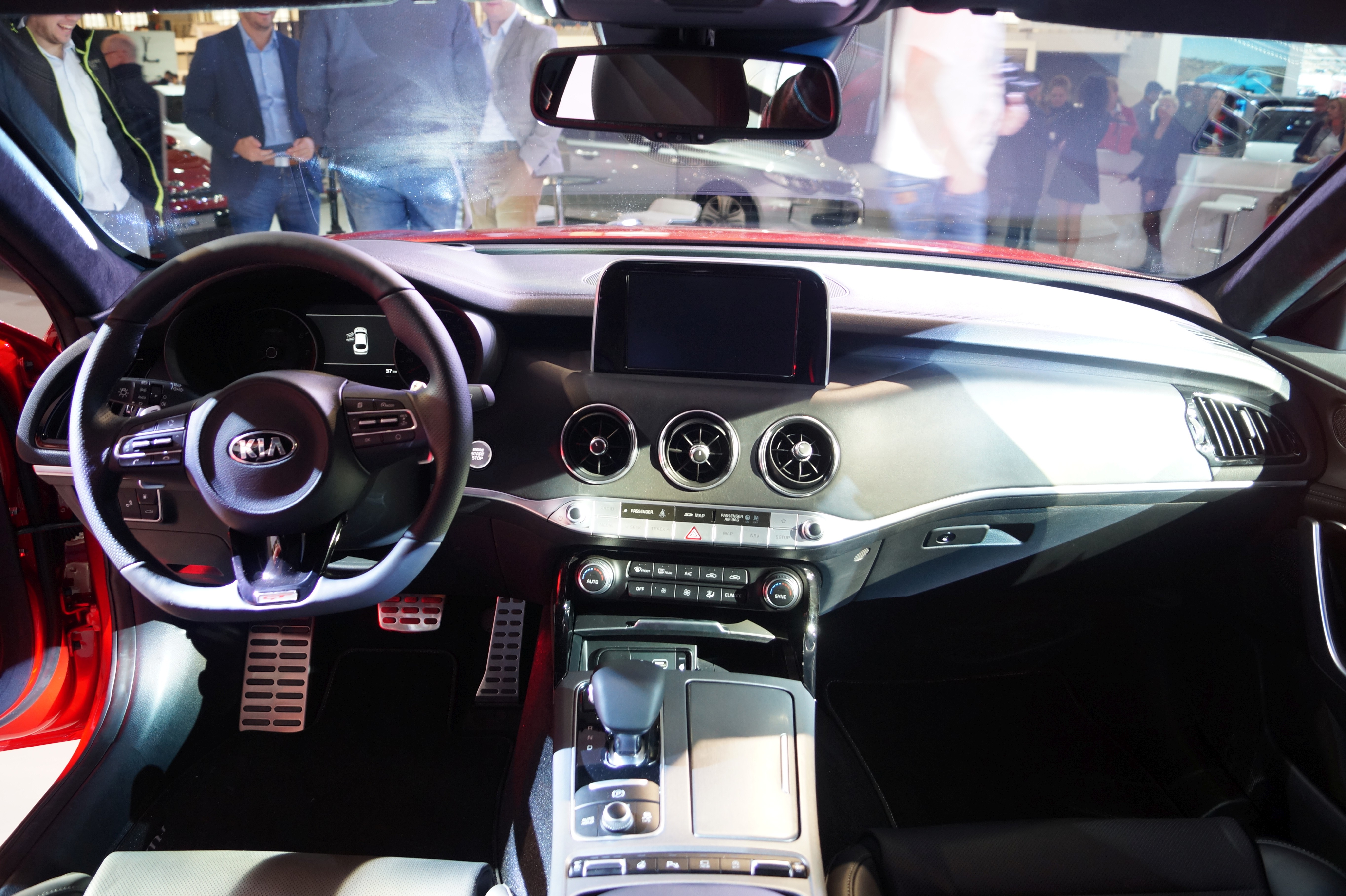 Wnętrze Kii Stinger na Motor Show Poznań 2017.